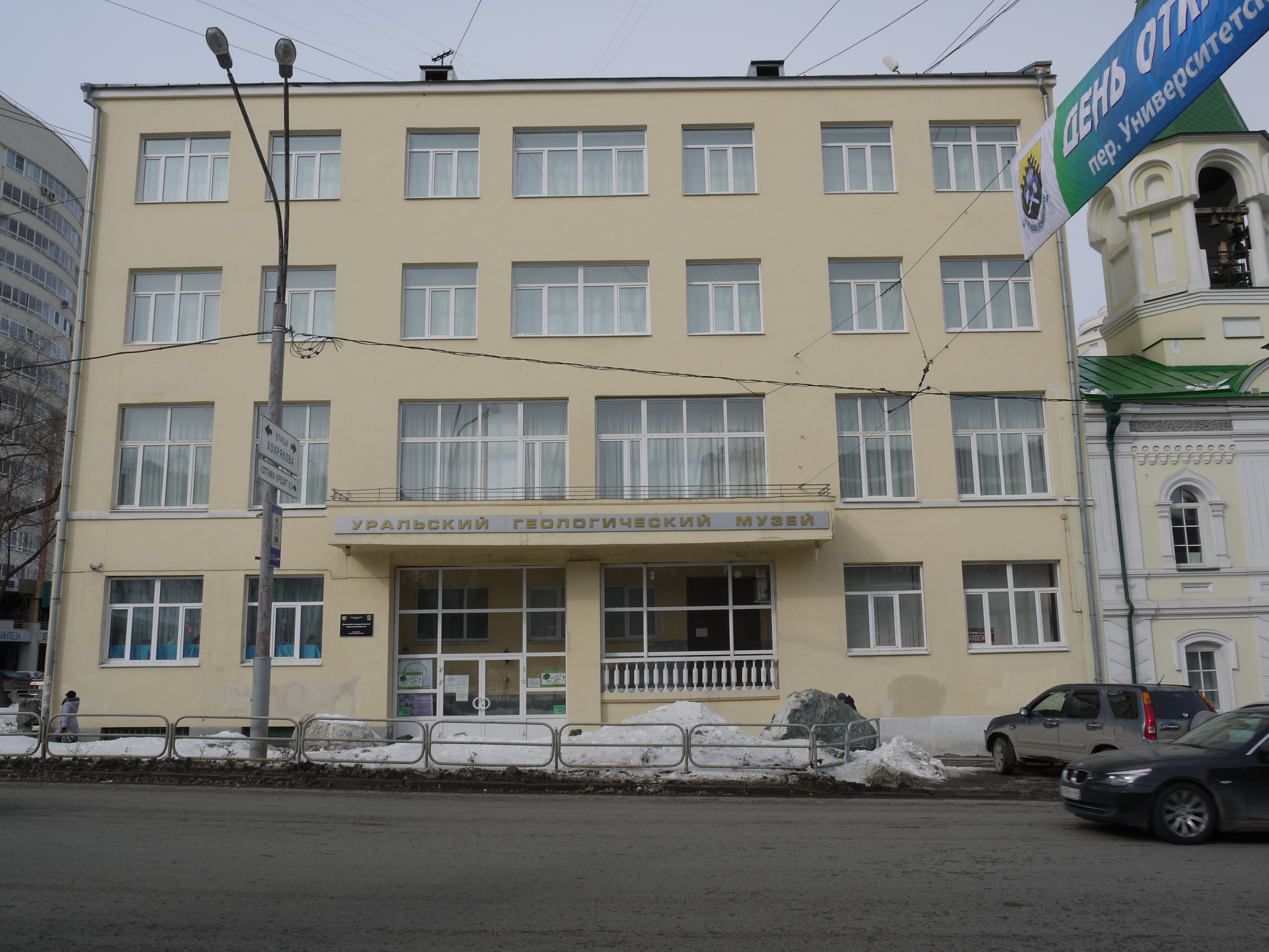 Вход в Уральский геологический музей